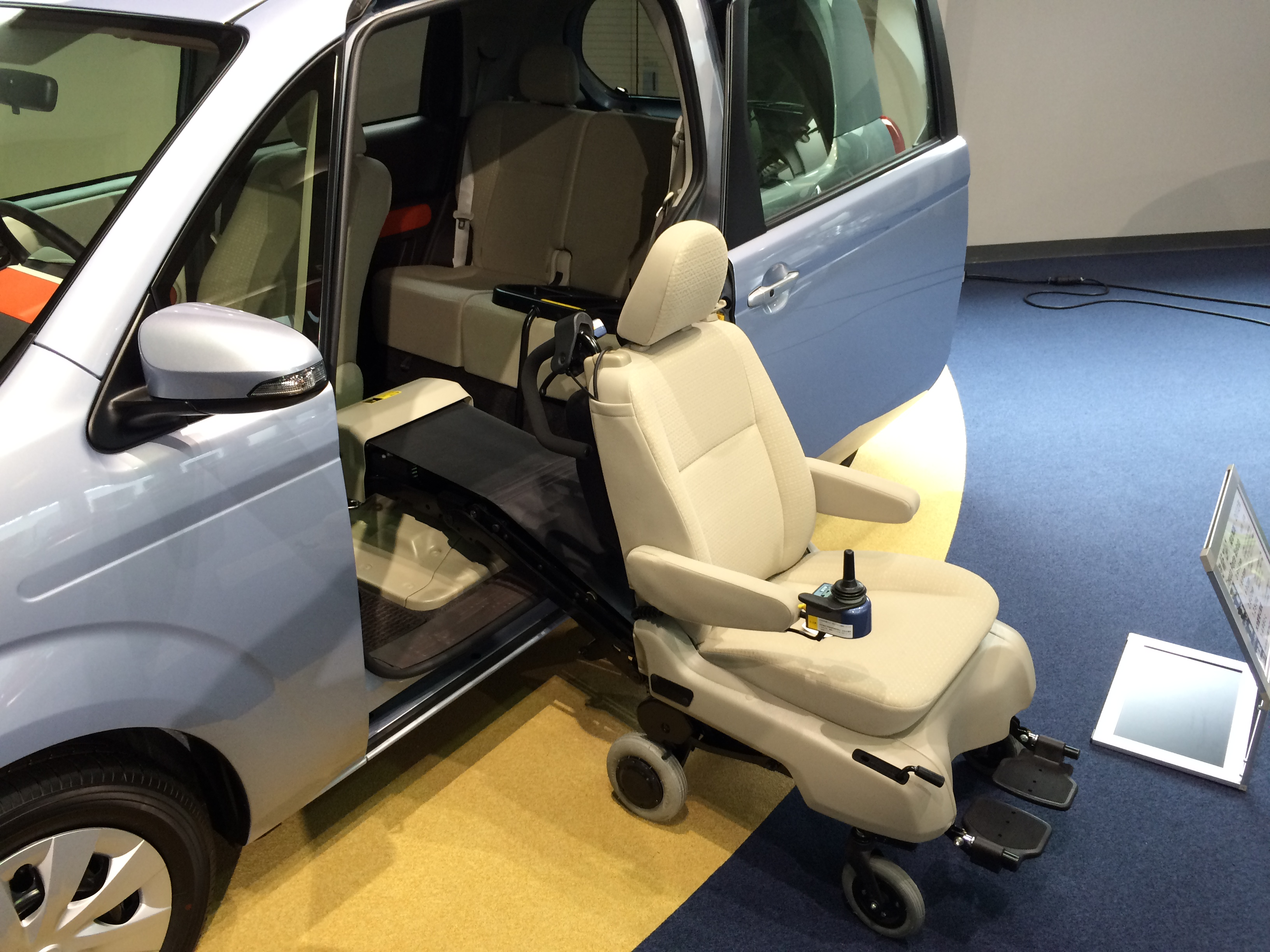 Toyota Porte Welcab (2012). Adapted automobile (Japan), in the Toyota Automobile Museum